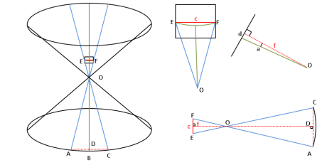 Représentation de la ligne d'horizon s'affichant au centre d'un capteur photographique